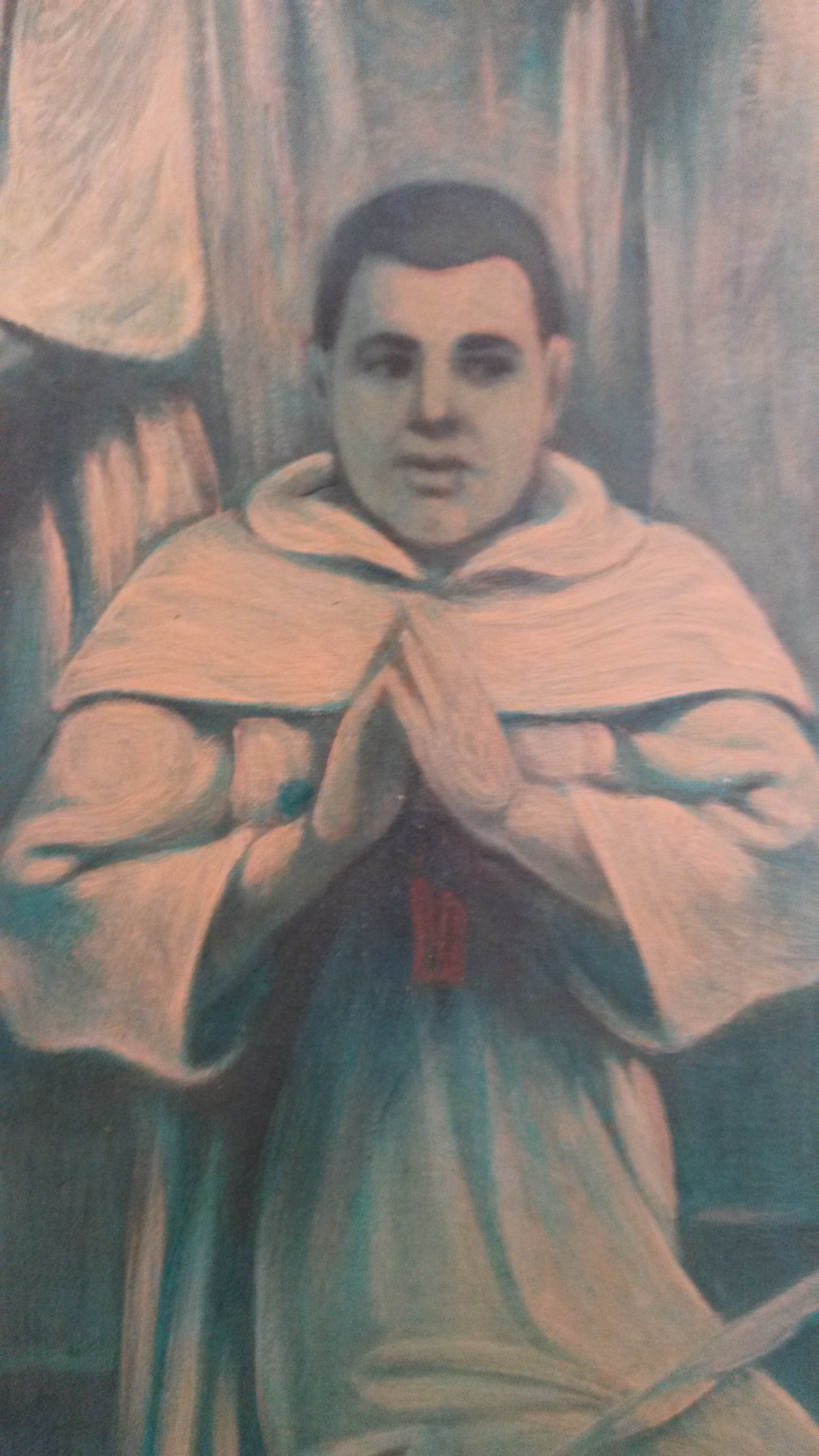 Particular del cuadro de San Hermenegildo de la Asunción y compañeros mártires que se venera en la iglesia de San Carlino alle quattro Fontane de Roma.